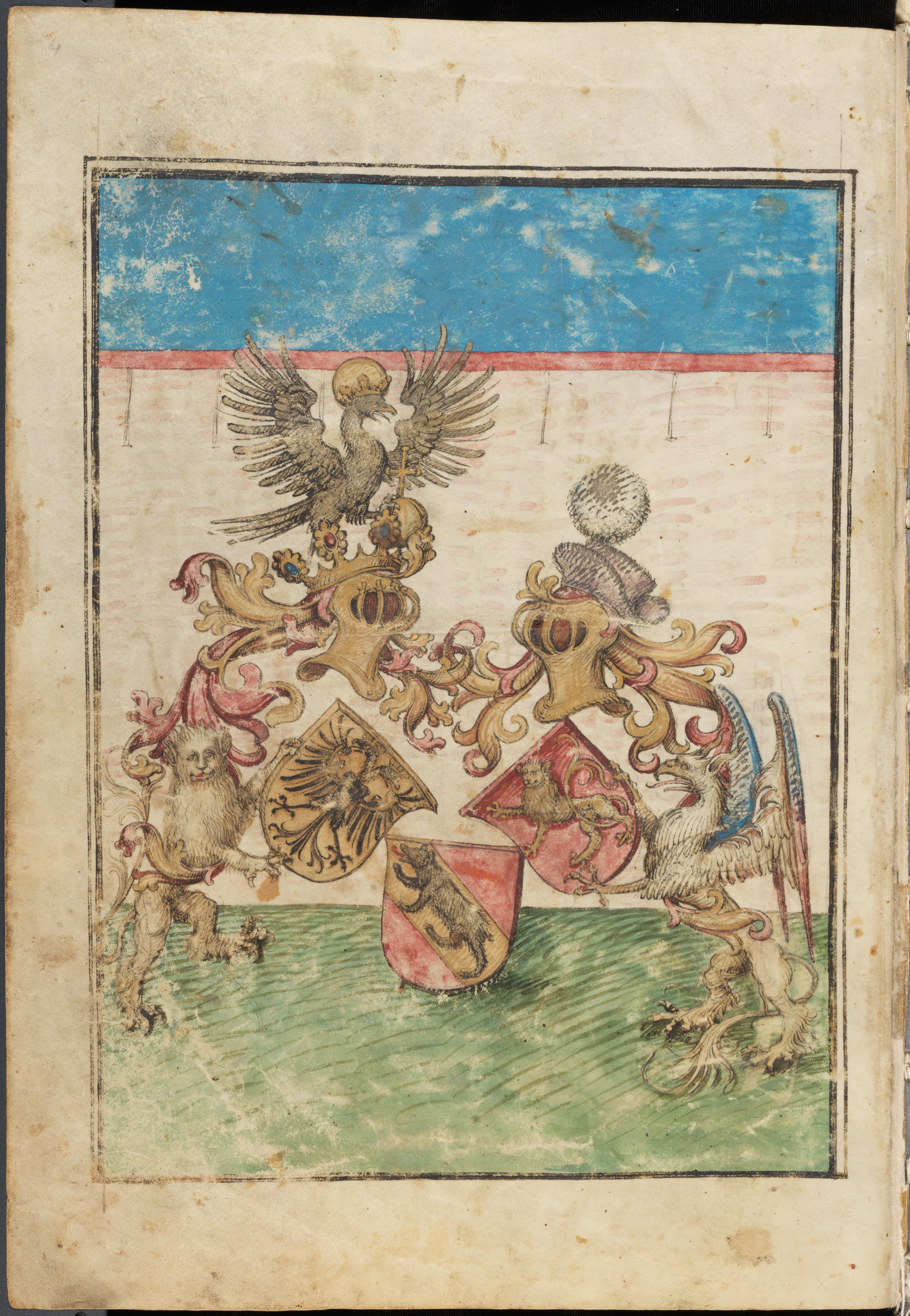 Page de titre du volume 1 de la "Amtliche Berner Chronik" de Diebold Schilling le Vieux, avec les héraldiques. A gauche le fanion du Saint-Empire Romain-Germanique, au centre l'armoirie de la ville de Berne, à droite le drapeau des Zähringen.